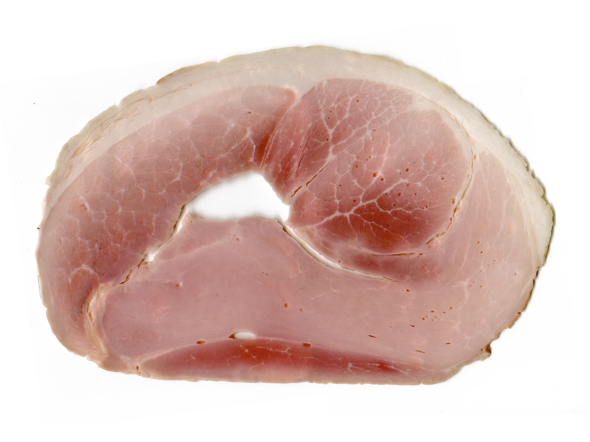 eine Scheibe gekochter Schinken